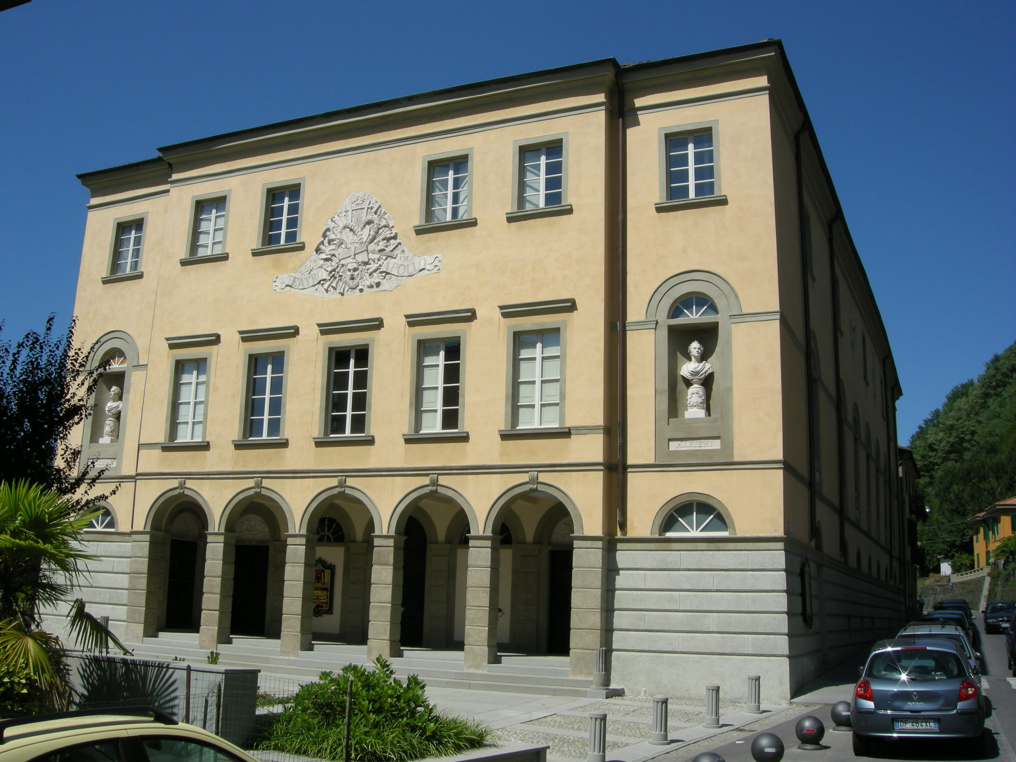 Teatro comunale vittorio alfieri, castelnuovo garfagnana 01